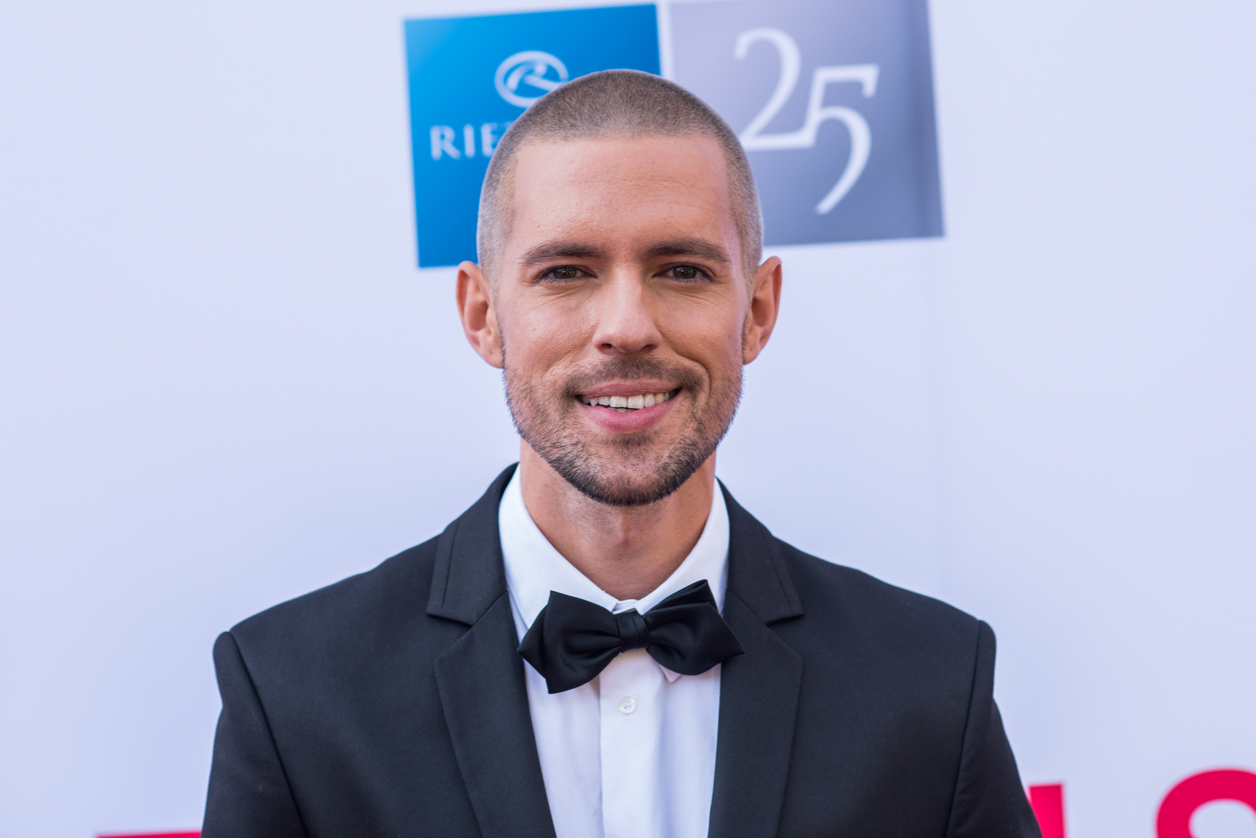 Маркус Рива Лайма Вайкуле и Freedom Ballet на фестивале «Лайма. Рандеву. Юрмала 2017»